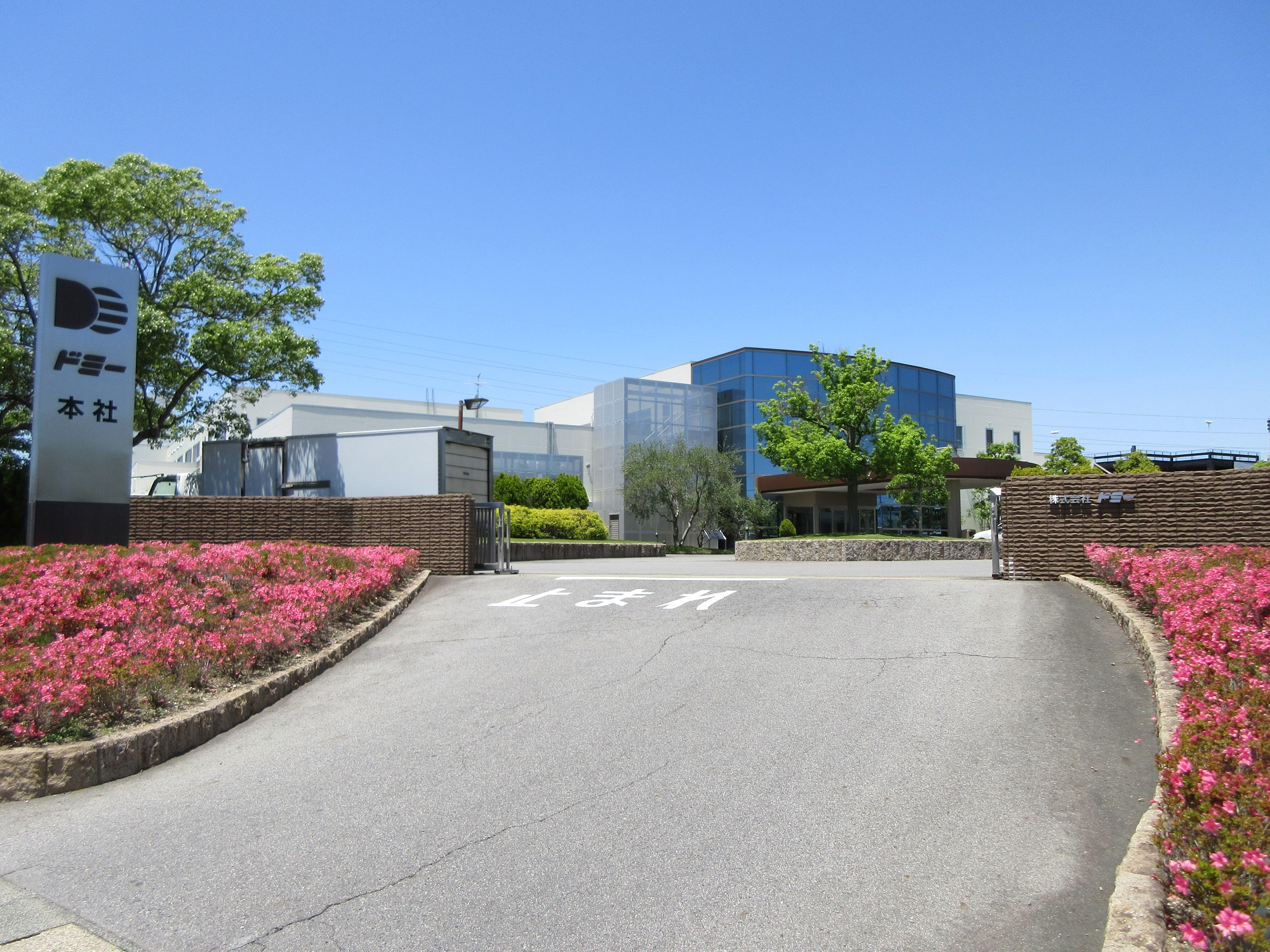 株式会社ドミー（岡崎市大平町）